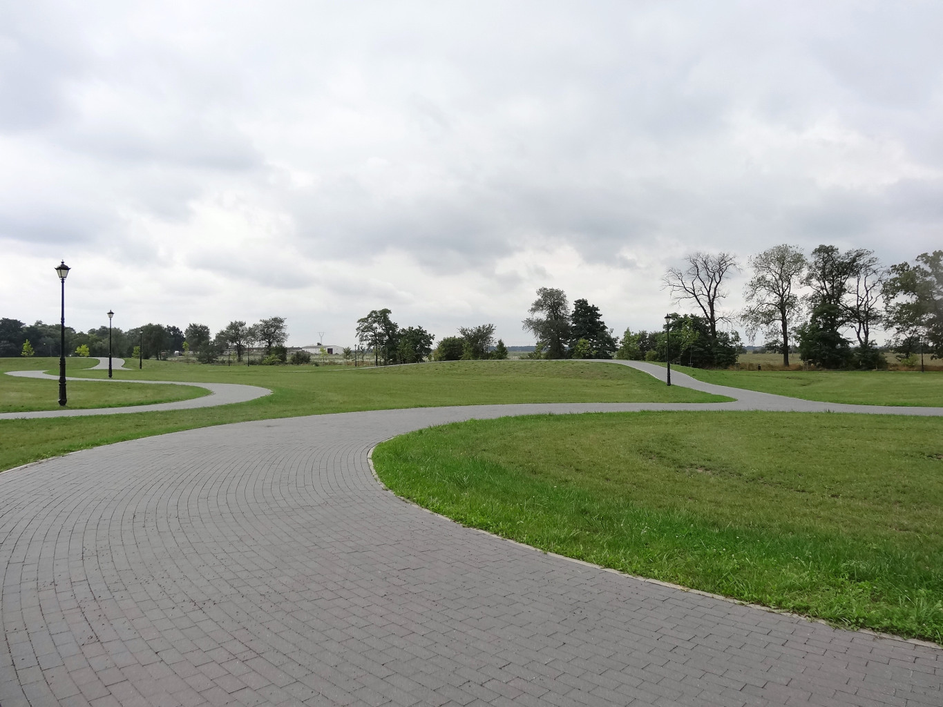 Nowa część parku Solankowego w Inowrocławiu